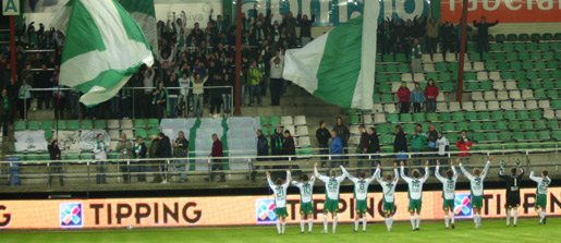 Bilde fra Ham-Kam - Alta 7-0, 2009.